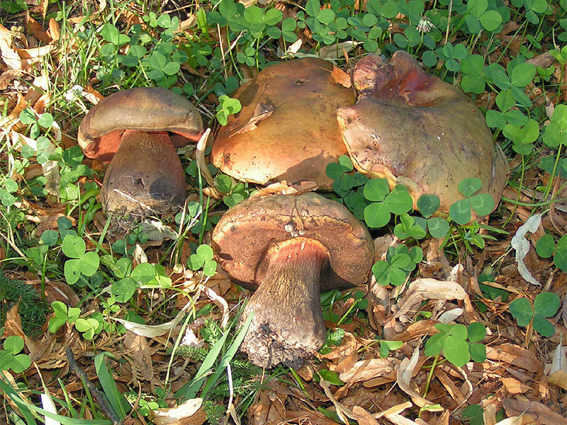 Boletus luridus - Boletaceae - Boletales